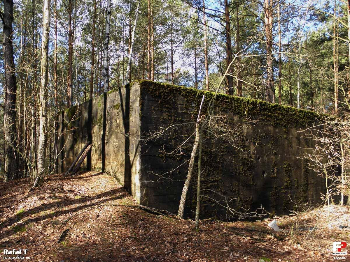 Schron amunicyjny położony przy leśnej drodze.